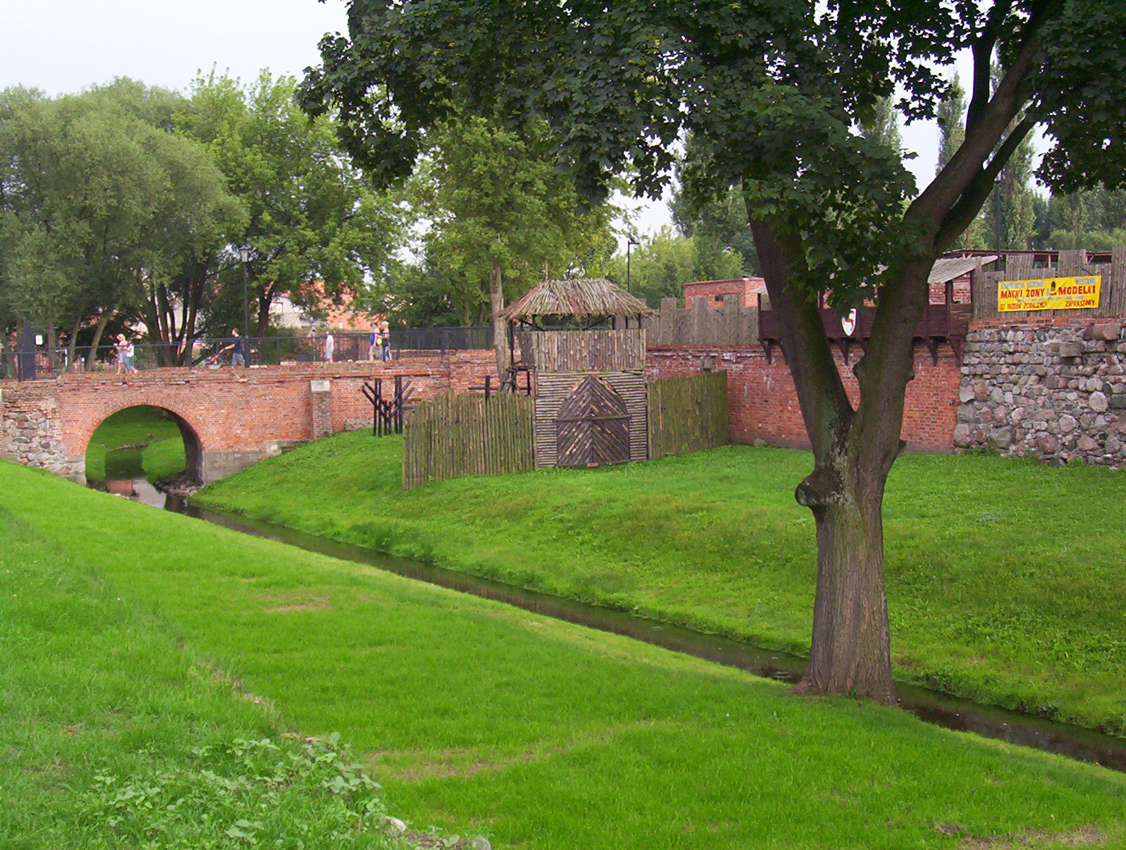 Zamek w Brodnicy, fosa zamkowa